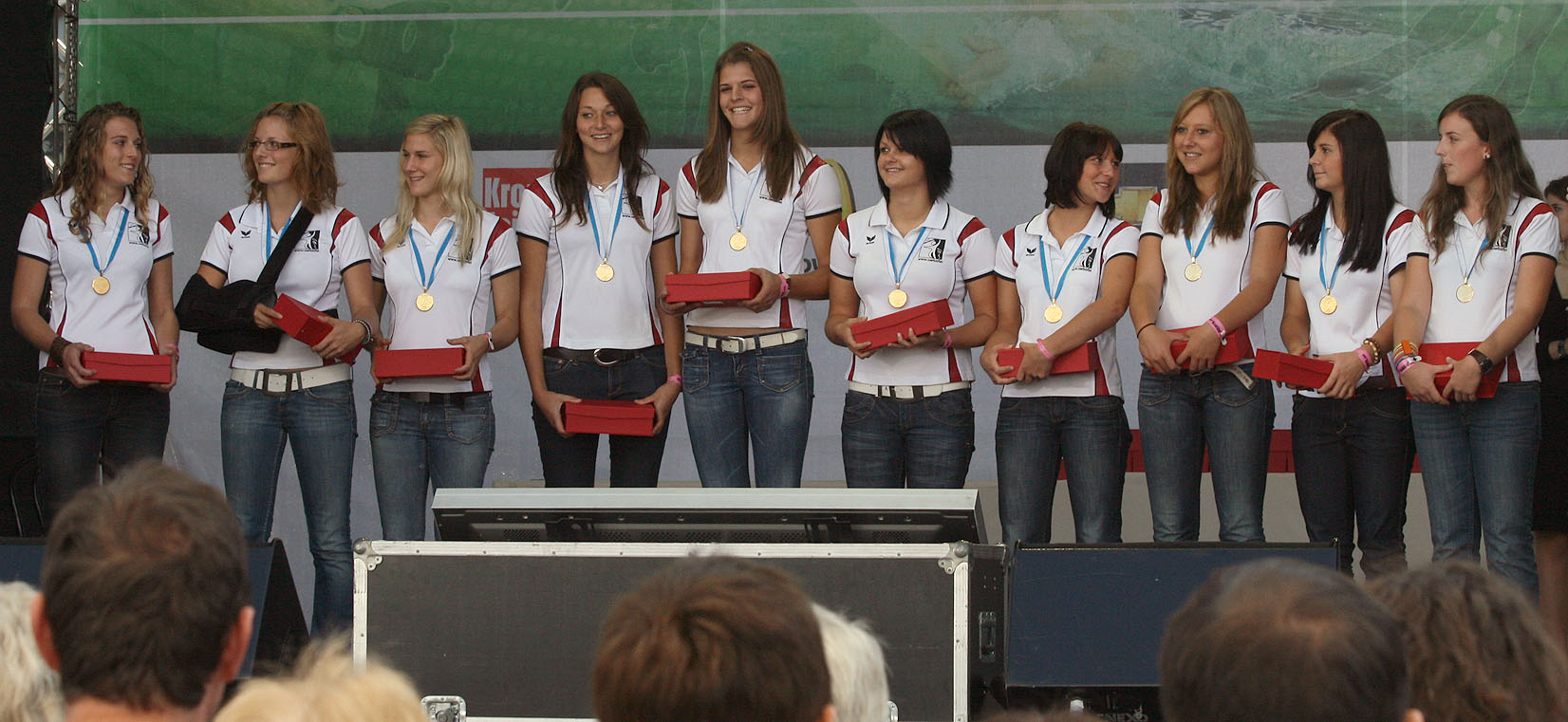 Die österreichische u18 Faustball-Nationalmannschaft der Frauen am Tag des Sports 2009 auf dem Heldenplatz in Wien